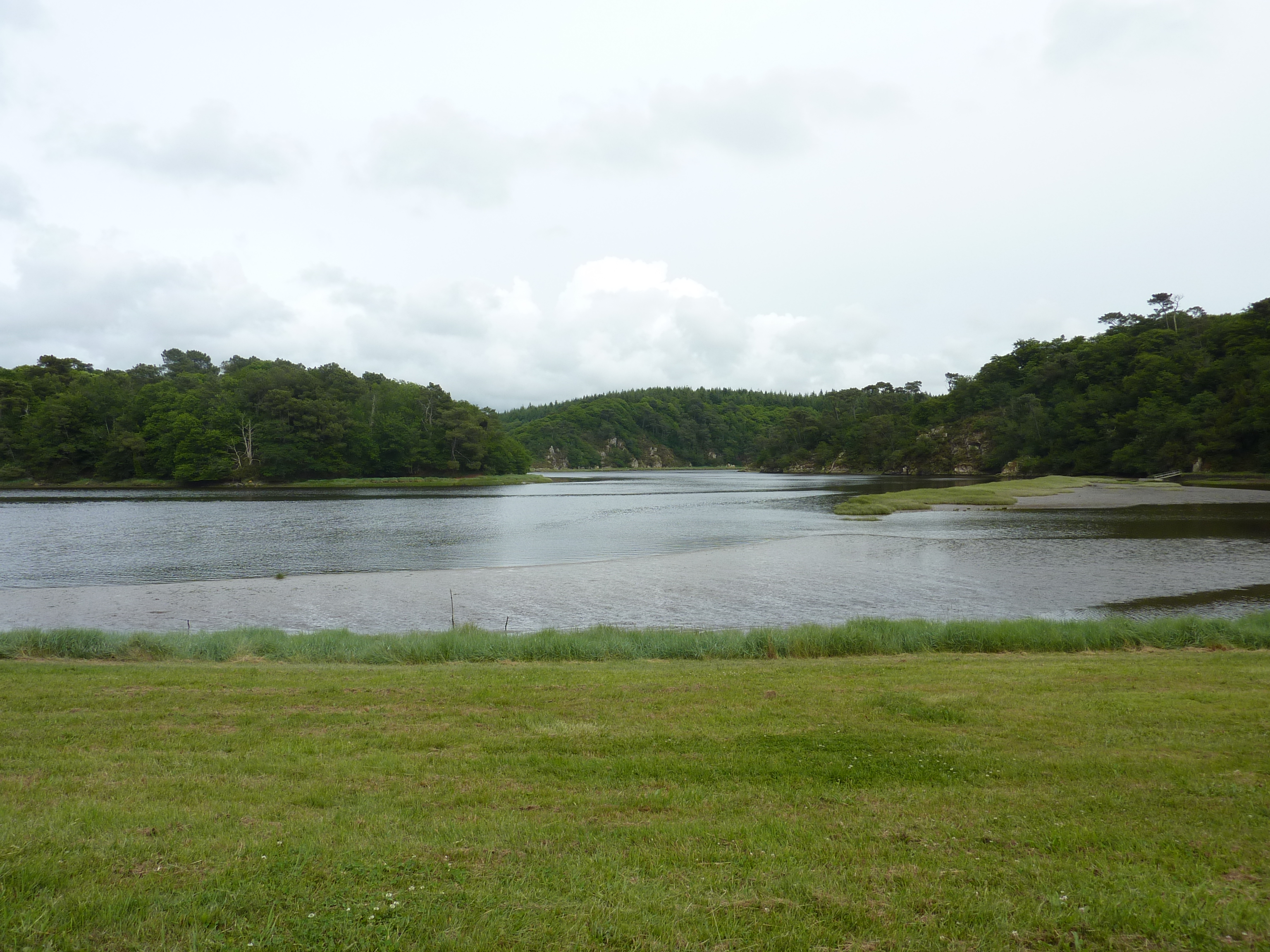 La Laïta aux abords de l'abbaye Saint-Maurice